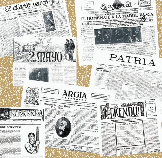 Euskal kazetaritzaren aldi gorena. 1900-1936